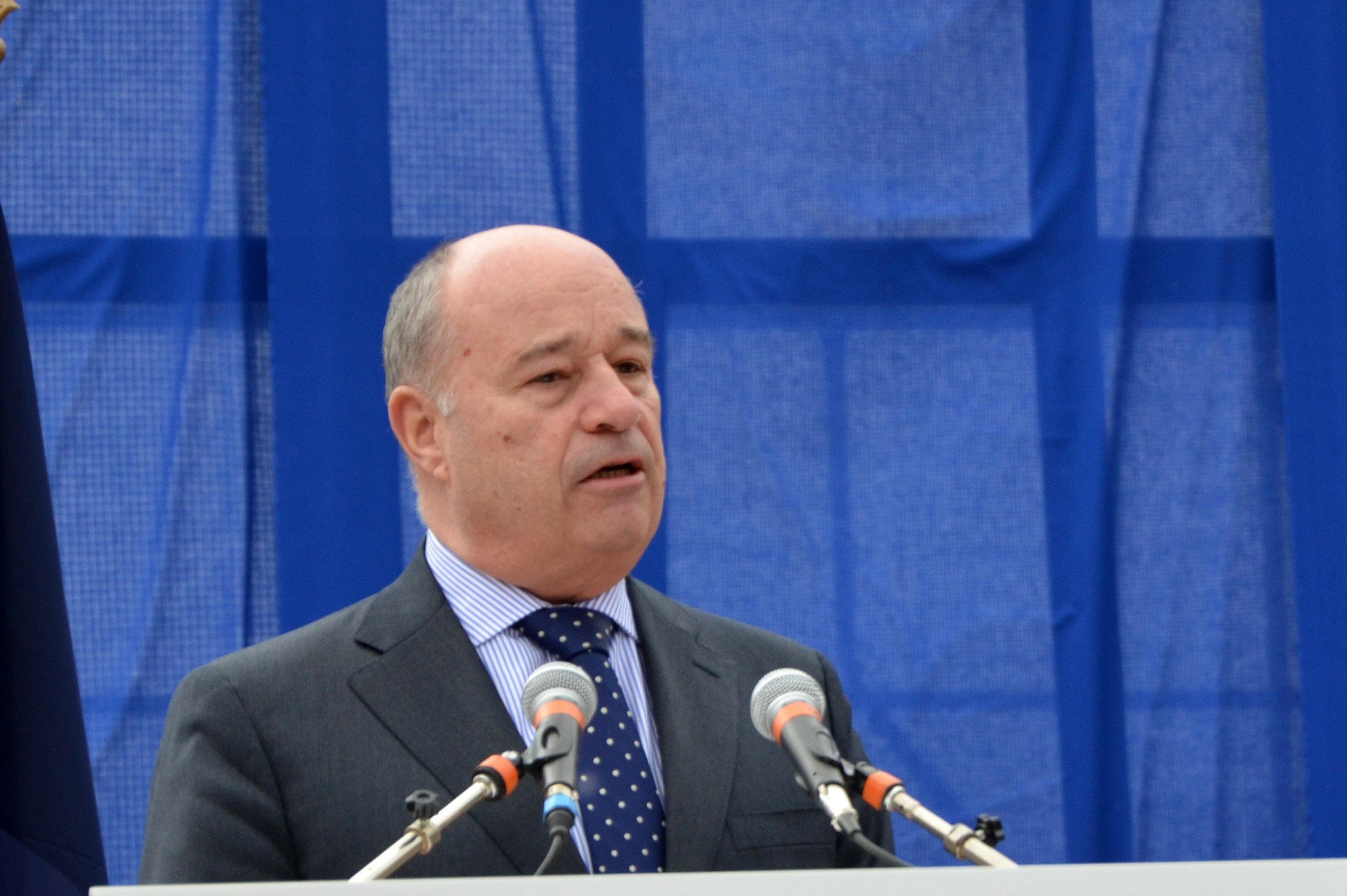 Jean-Michel Baylet au meeting de François Hollande à Carmaux